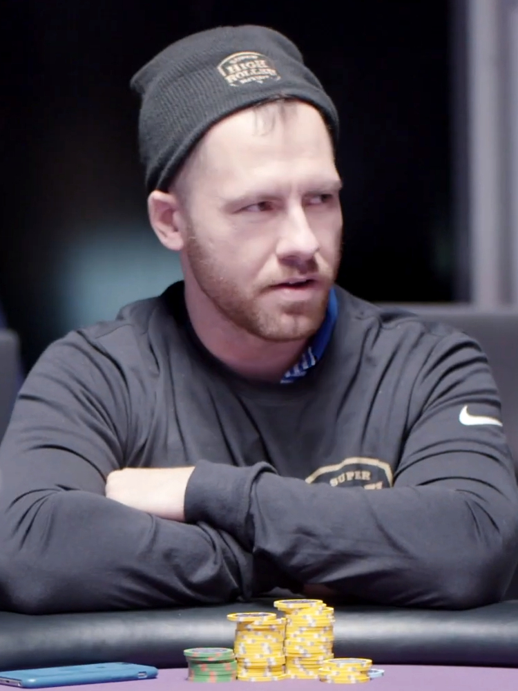 Daniel Cates beim Super High Roller Bowl V